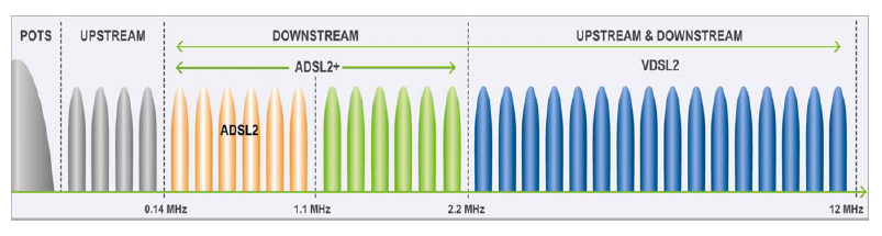 En la imagen se puede apreciar la extensión en las bandas de frecuencia superiores que usa la tecnología VDSL2 con respecto a tecnologías anteriores como la ADSL